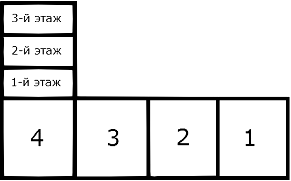 Свободная замена иллюстрации — План мастерового корпуса. 1898 год